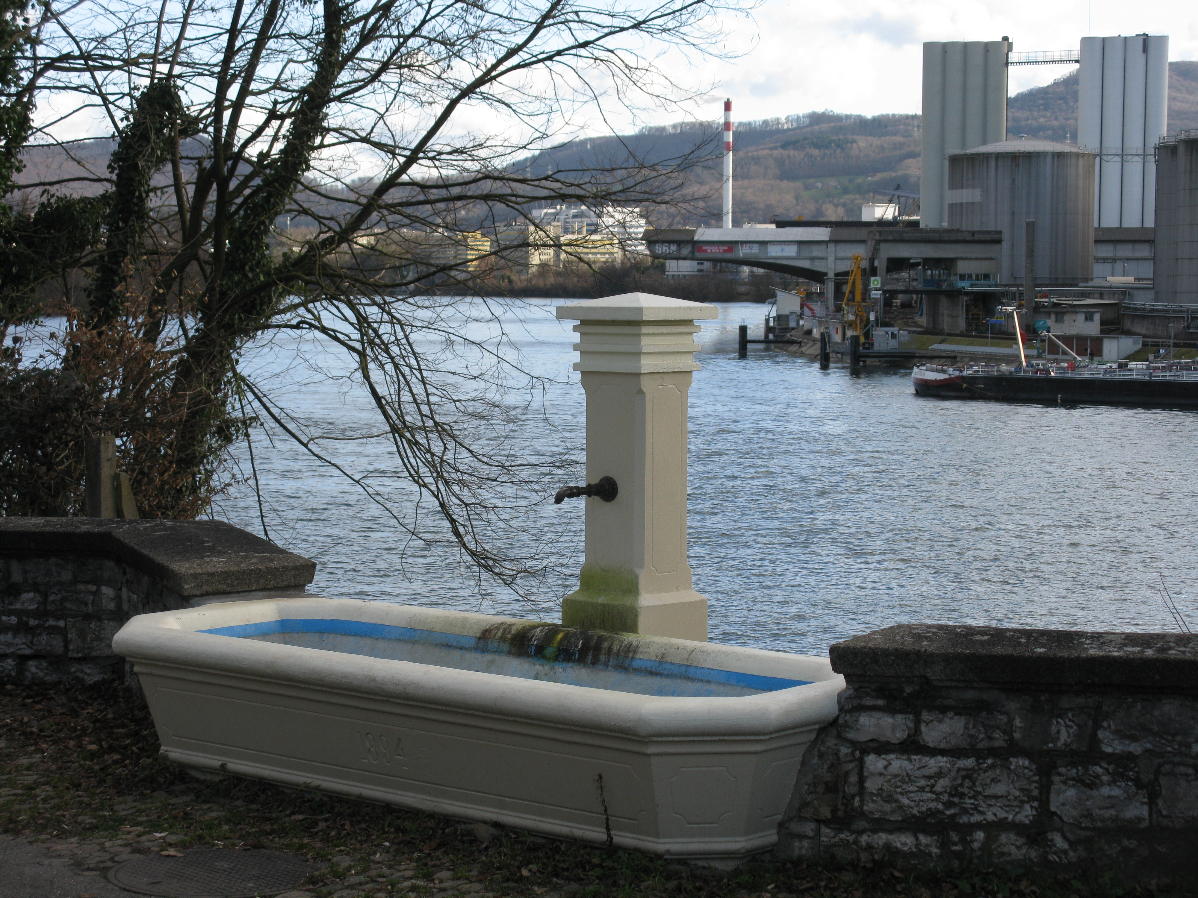 Blick von der Anlegestelle Grenzach nach Schweizerhalle